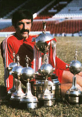 Ricardo Elbio Pavoni junto a todas la copas que ganó en el Club Atlético Independiente.